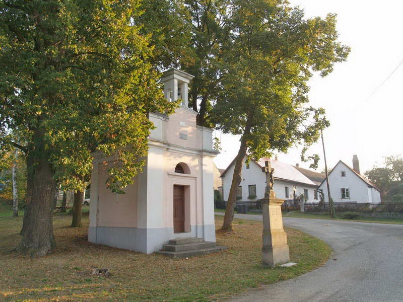 Kaple sv. Prokopa na návsi